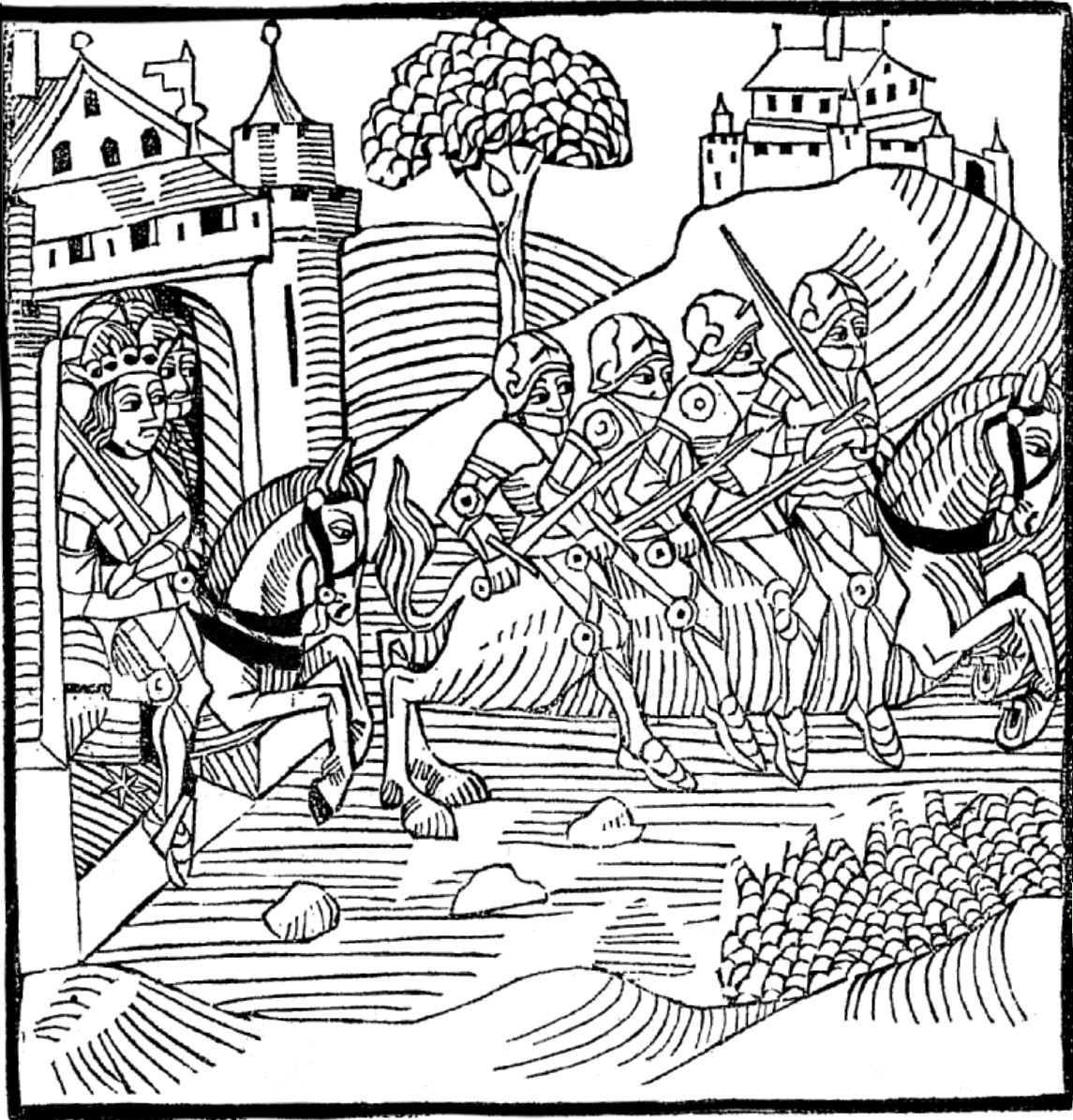 La fuite des 4 fils Aymon sur Bayard d'après un incunable de Lyon, conservé à la bibliothèque universitaire de Liège.